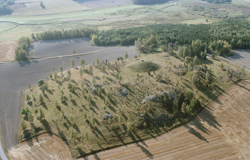 Gravfältet Uppsa kulle - RAÄnr Runtuna 144:1. Bilden är tagen mot (väderstreck): S Motiv: Runtuna 144:1 Nyckelord: Flygbilder, Riksintressen Kategori: Gravfält Gravfältet Uppsa kulle - RAÄnr Runtuna 144:1. Bilden är tagen mot (väderstreck): S. Runtuna 144:1.